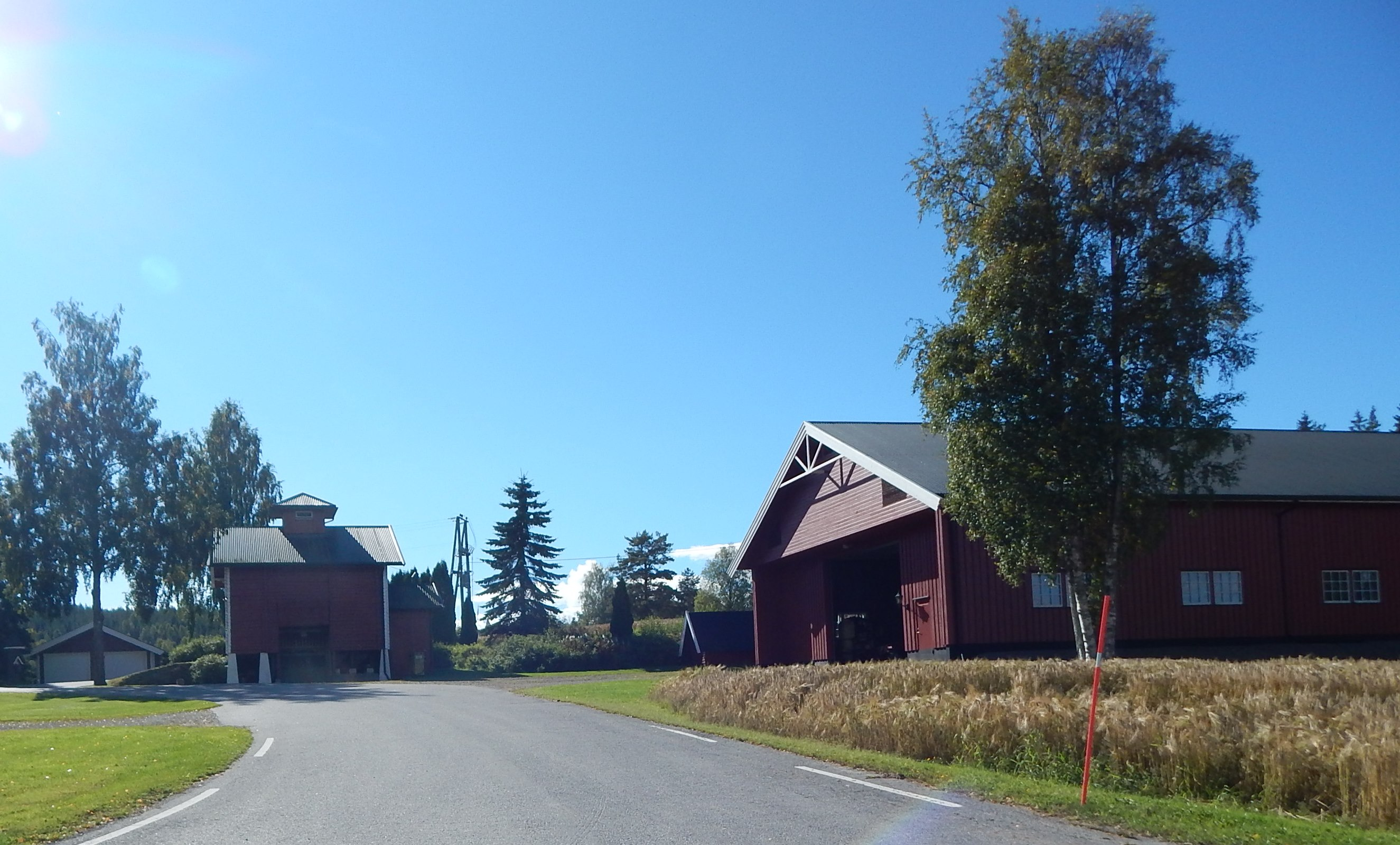 Sjølivegen (fylkesvei 448) sett fra Vestre Gjesåsveg (fylkesvei 451)